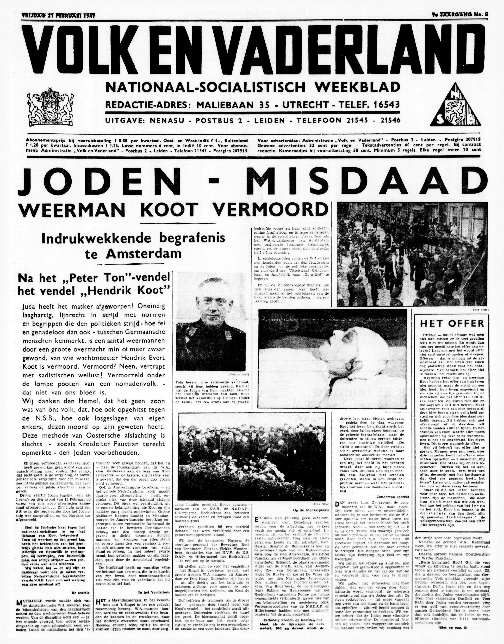 kop "JODEN – MISDAAD WEERMAN KOOT VERMOORD" "Indrukwekkende begrafenis te Amsterdam Na het „Peter Ton”-vendel het vendel „Hendrik Koot”" in Volk en vaderland : weekblad der Nationaal-Socialistische Beweging in Nederland